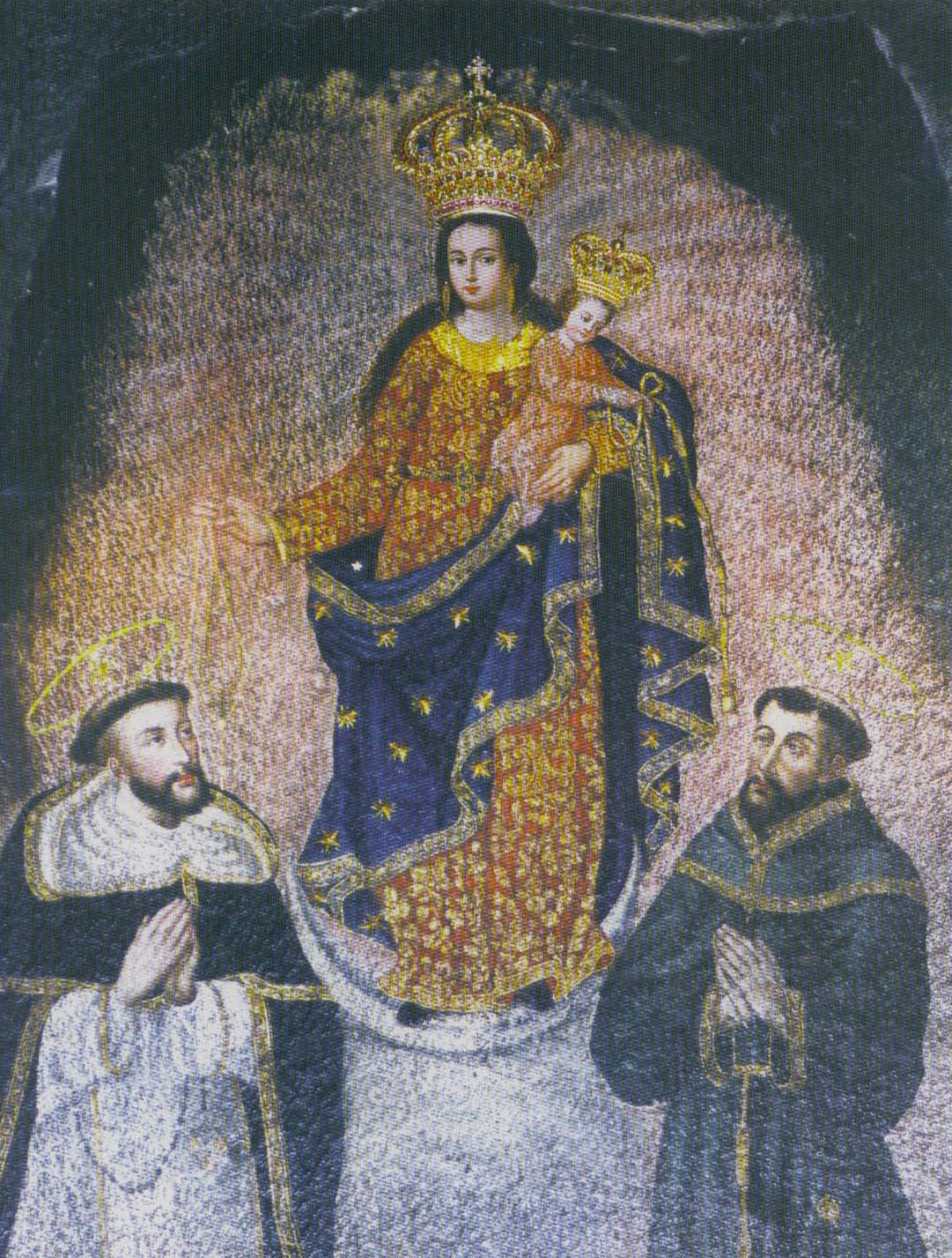 Imagen de Nuestra Señora de Las Lajas venerada en su santuario en el sur de Colombia